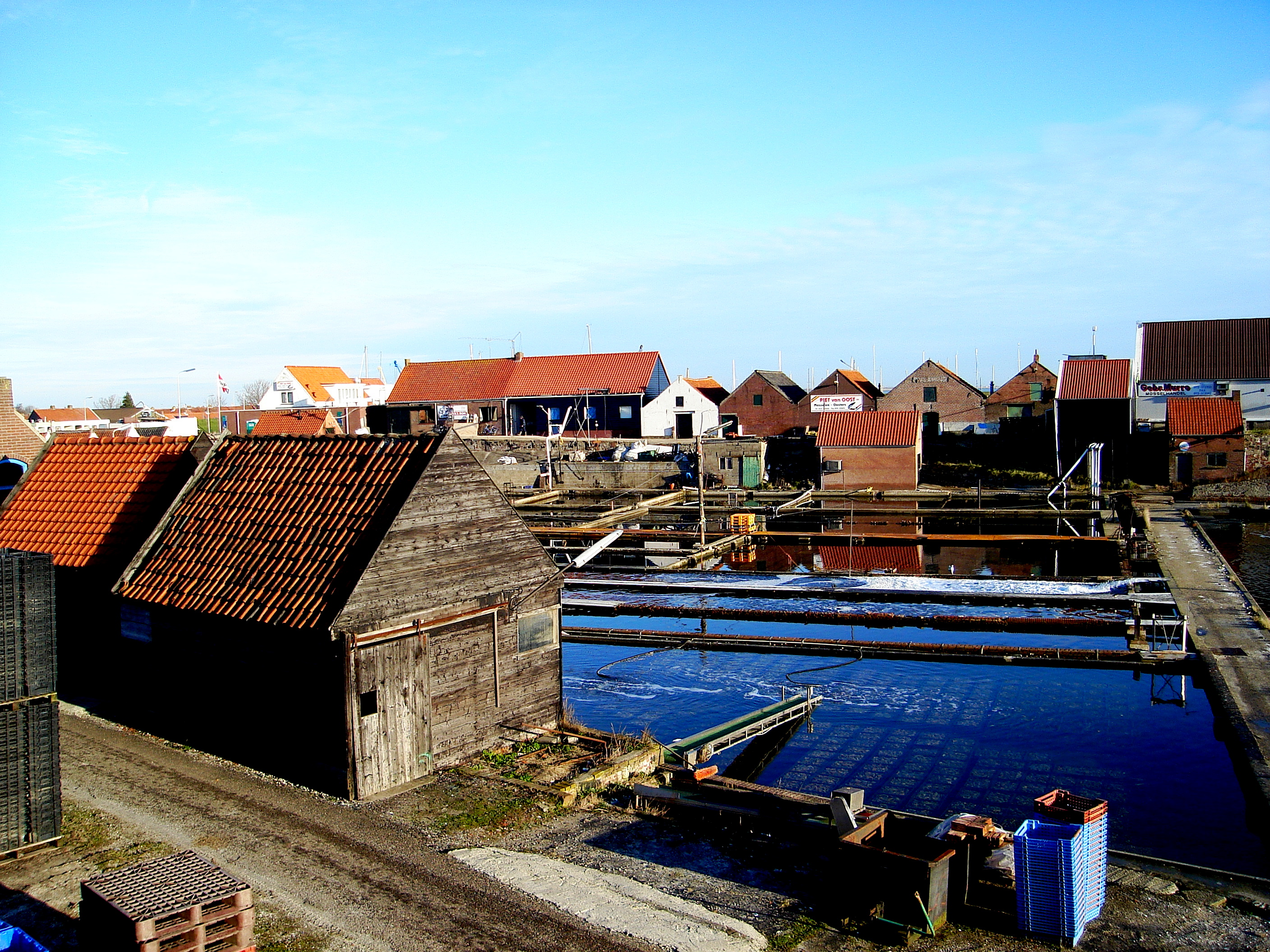 YERSEKE